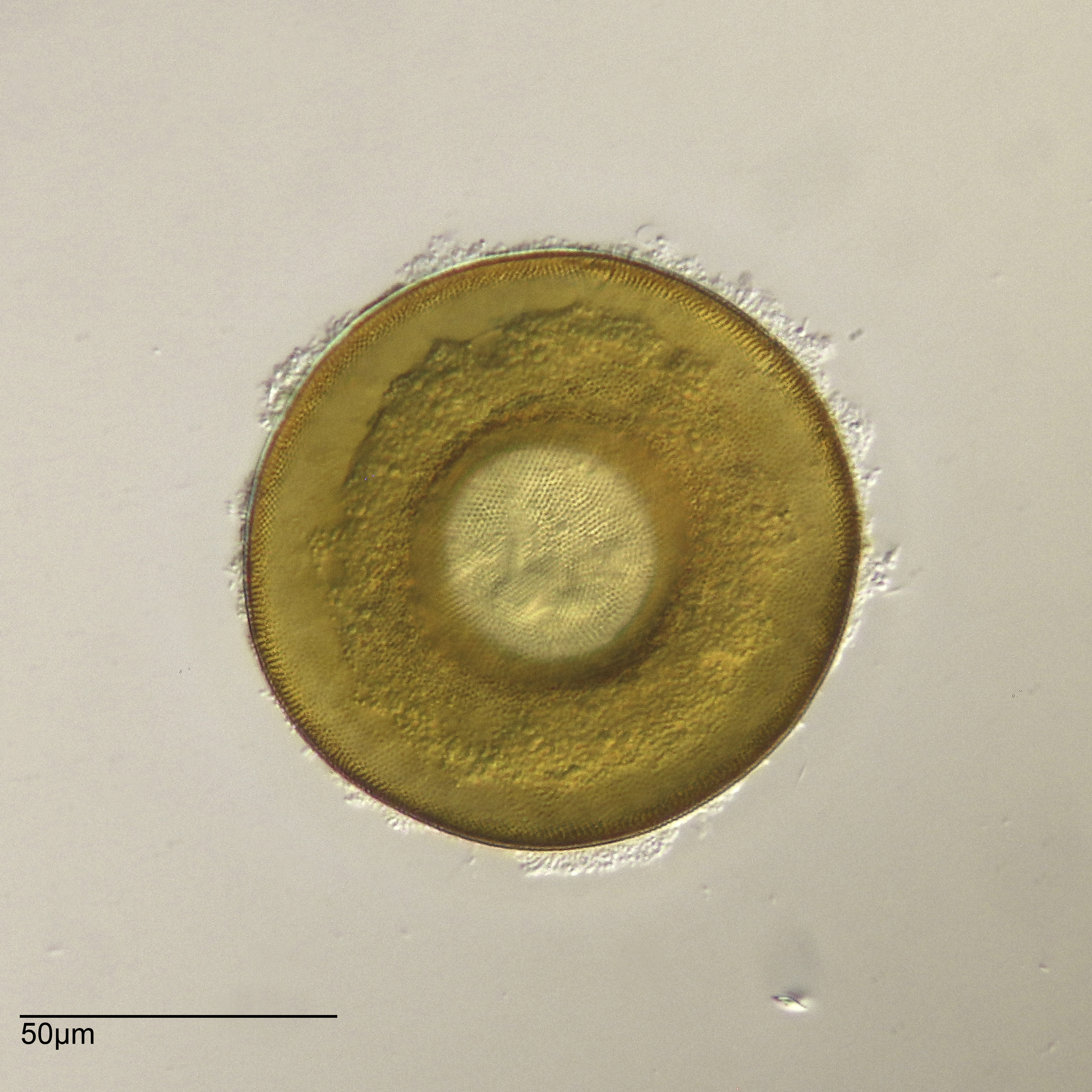 Stacked image